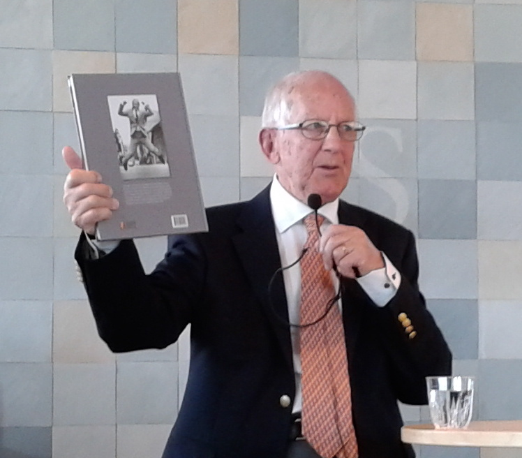 Göthe Anderson, tidigare kommunalråd, presenterar sin bok "Linköping : från industrikris till högteknologi" vid Östergötlands bokmässa på Linköpings stadsbibliotek den 20 september 2014.